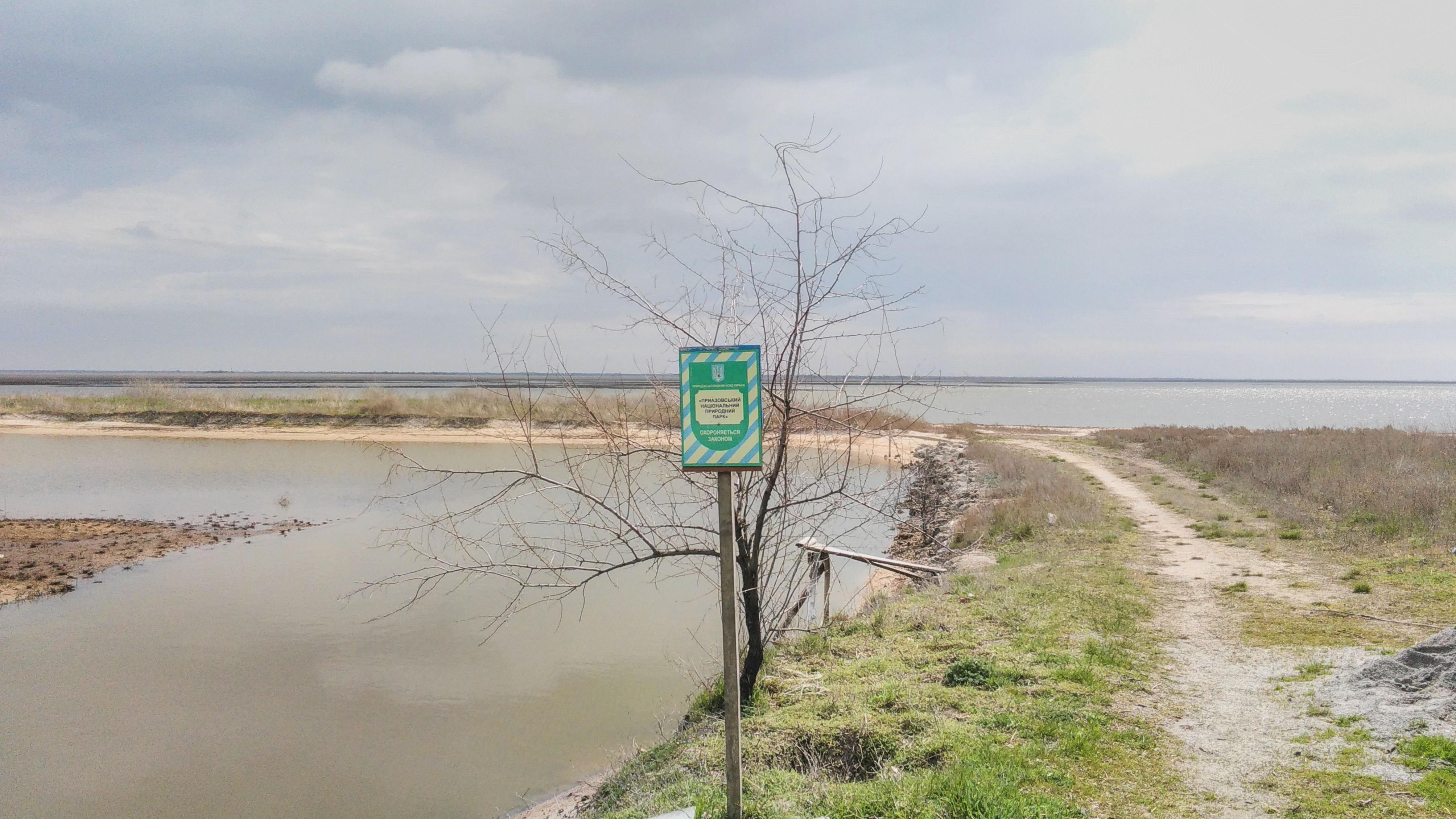 «Приазовський національний природний парк», Бердянський, Мелітопольський, Приазовський райони, міста Бердянськ та Мелітополь